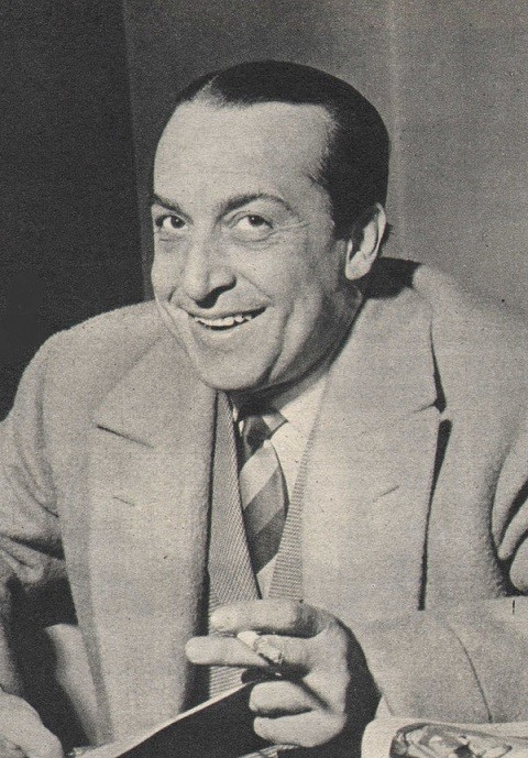 Nuto Navarrini